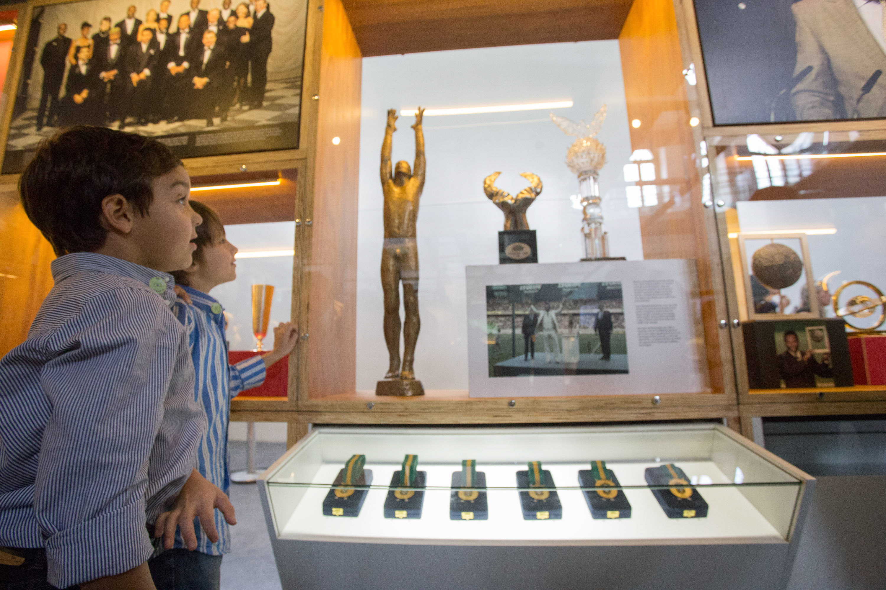 O governador Geraldo Alckmin participa da Inauguração do Museu Pelé - Acervo do Atleta Edson Arantes do Nascimento, o "Pelé" em Santos, São Paulo.Data: 15/06/2014. Local: Santos/SP. Foto: Diogo Moreira/A2 FOTOGRAFIA.